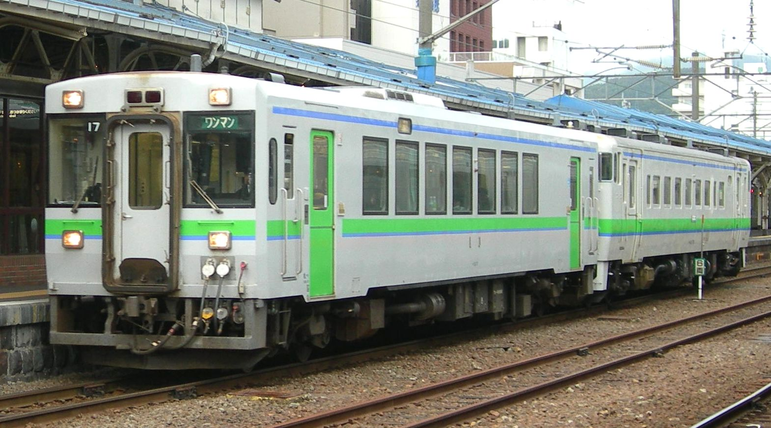 JR北海道キハ150形気動車